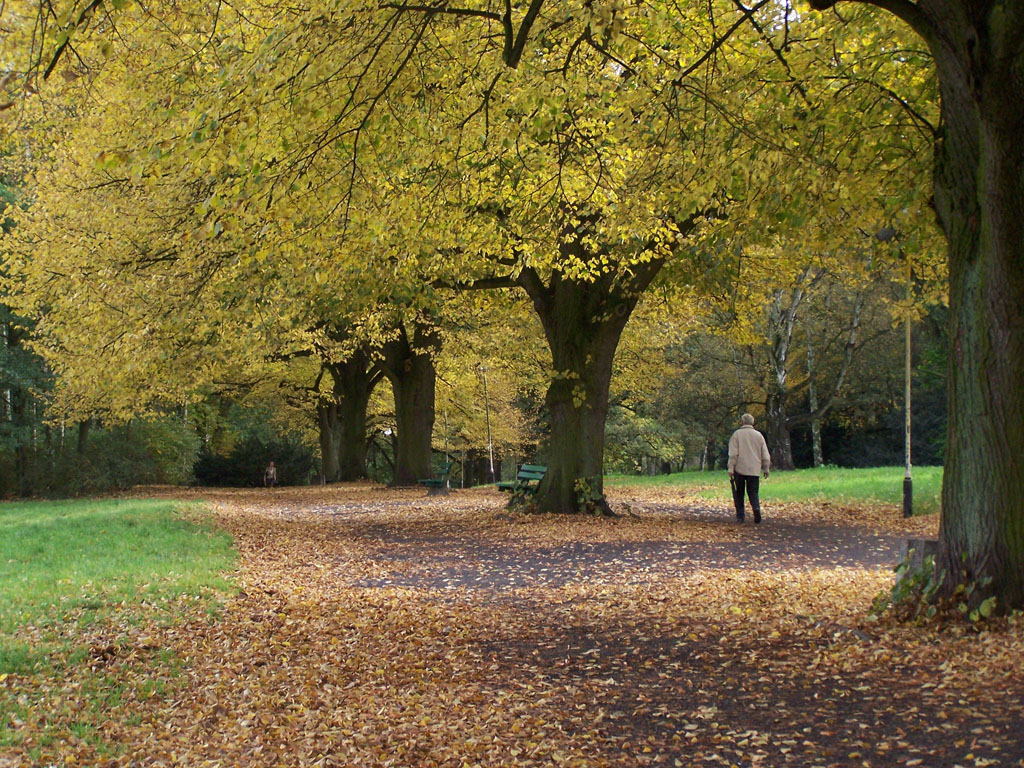 Park Kasprowicza w Szczecinie